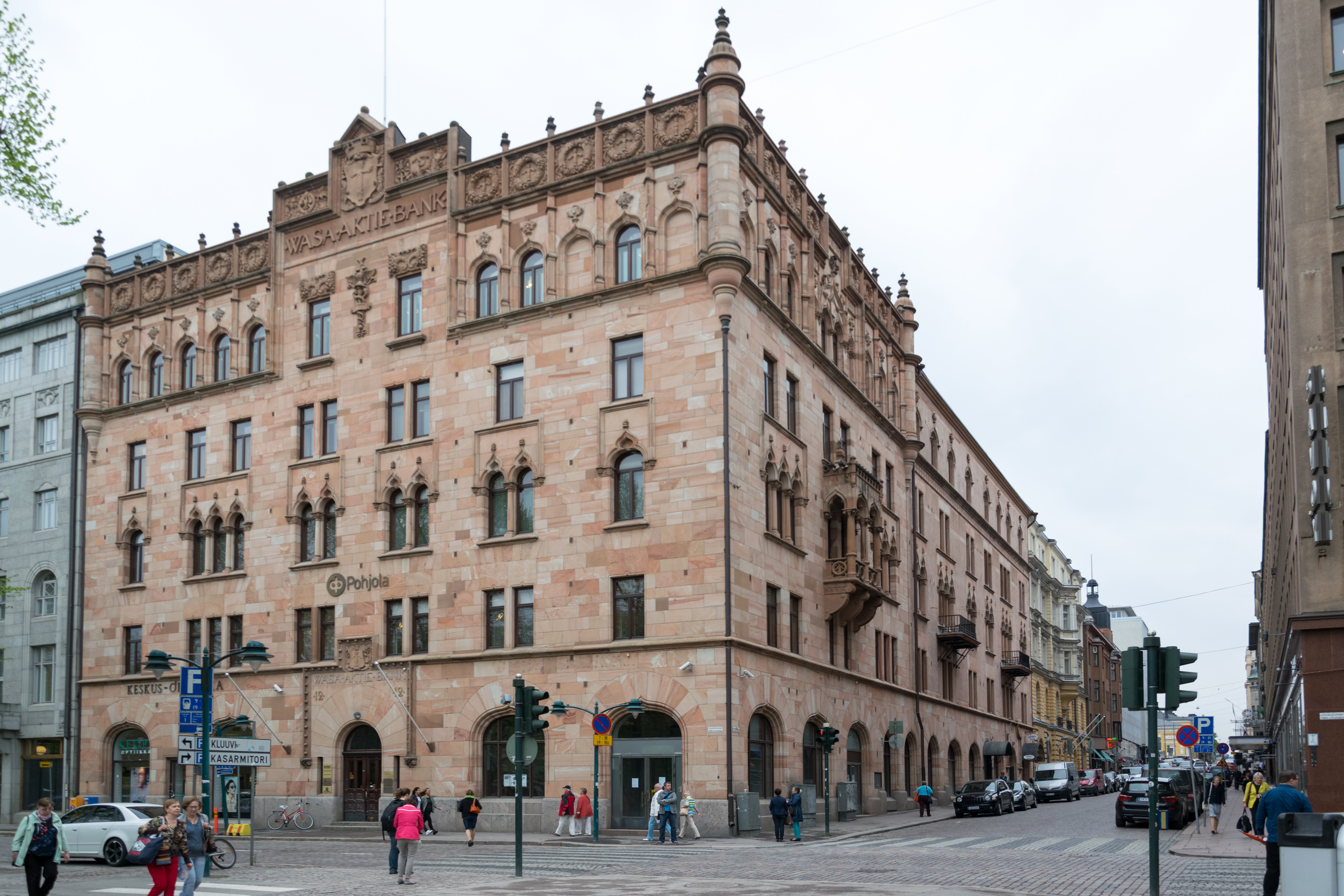 Wasa aktie bank helsingissä